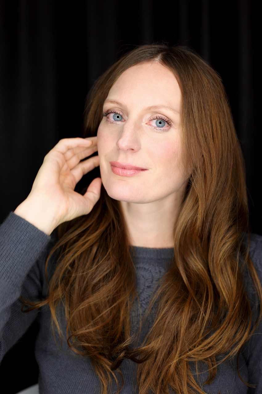 Portraitfotografie der österreichischen Sängerin Maria Weiss